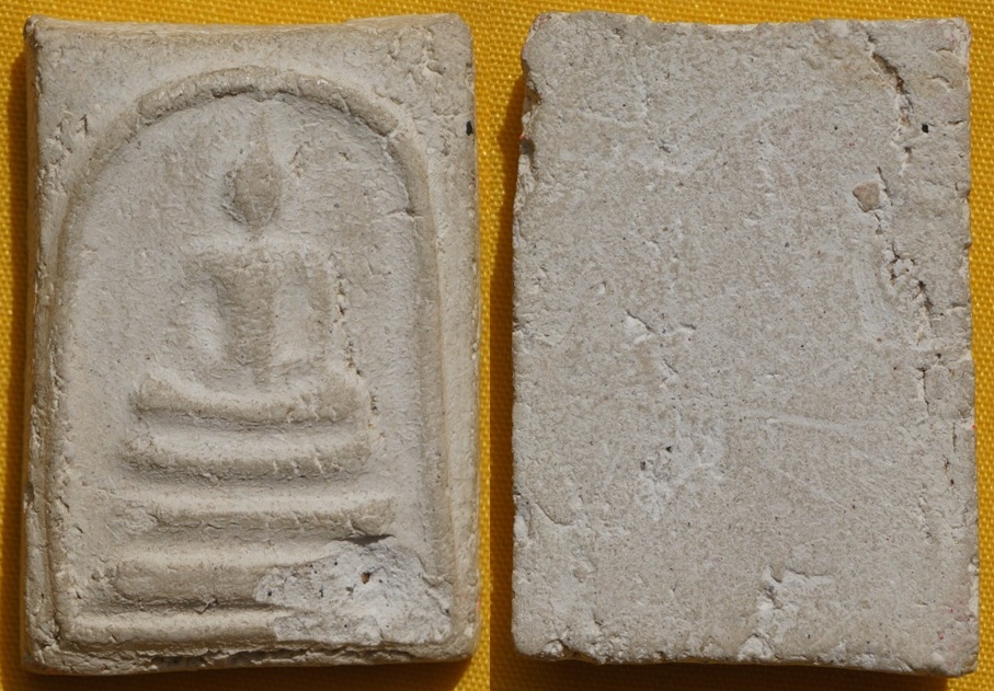 หลวงปู่ทอง วัดราชโยธา พระสมเด็จ รุ่นหนึ่ง